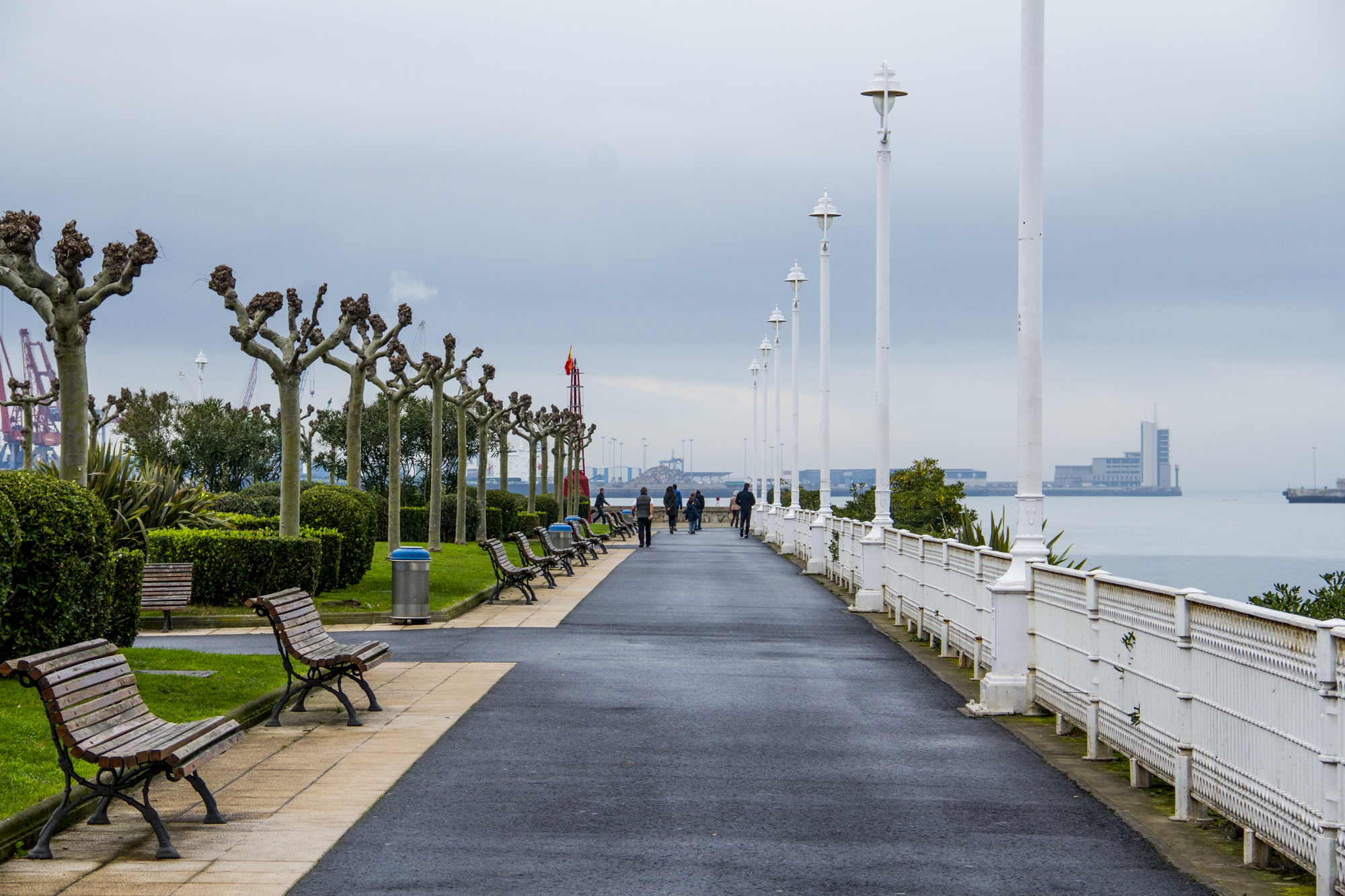 El pase del Muelle de Churruca en un día lluvioso.